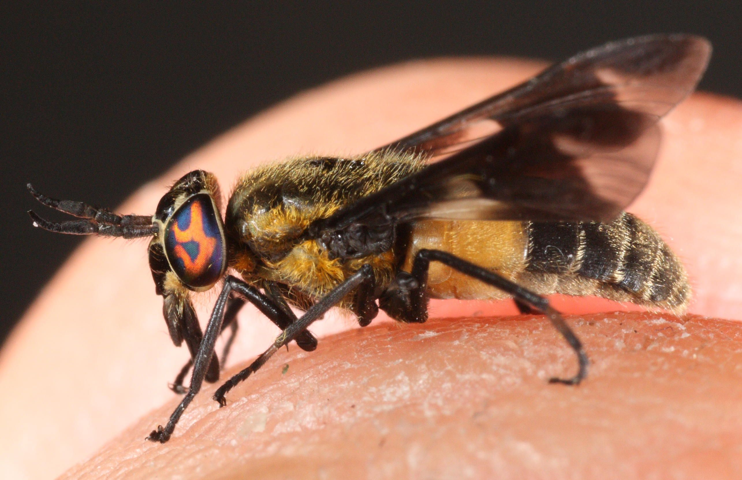 Bredmerket blinding Chrysops caecutiens har kraftige kjever